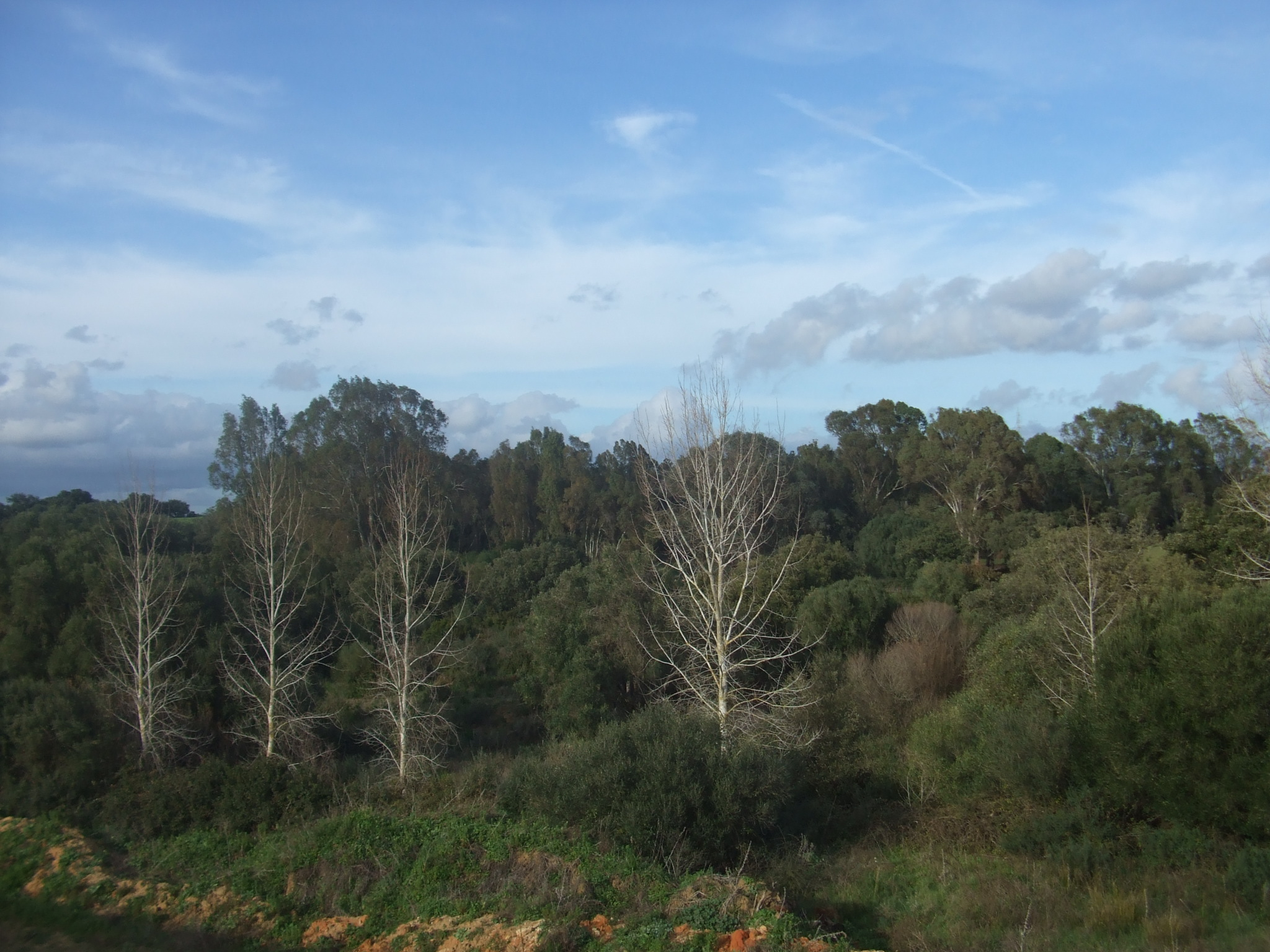 Vista del Pinar del Rey desde la A-405.